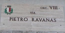 Lapide Via Pietro Ravanas a Bari (italia)